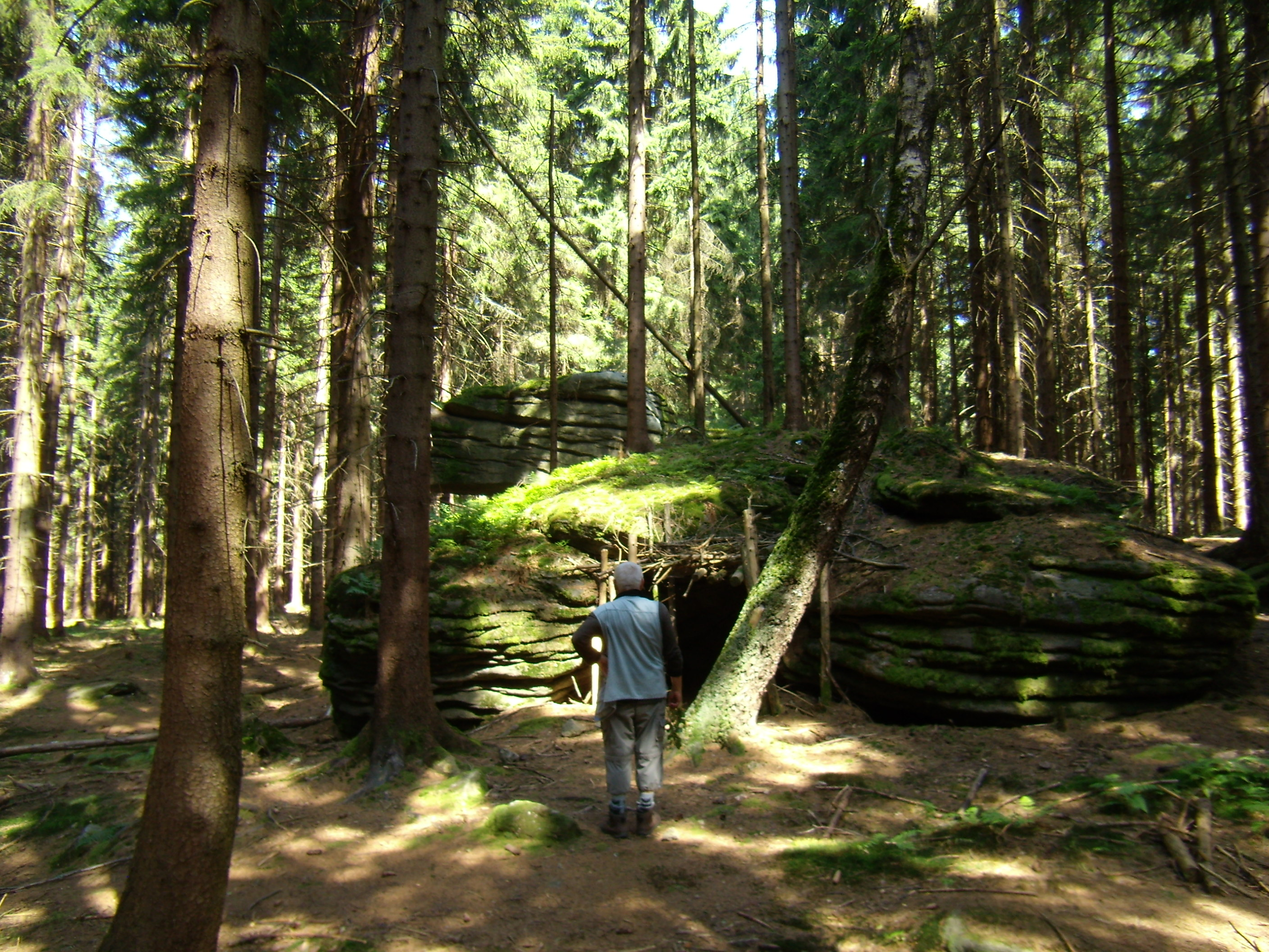 Šelmberk - nepatrné pozůstatky hradu poblíž Ostrůvku u Lesné